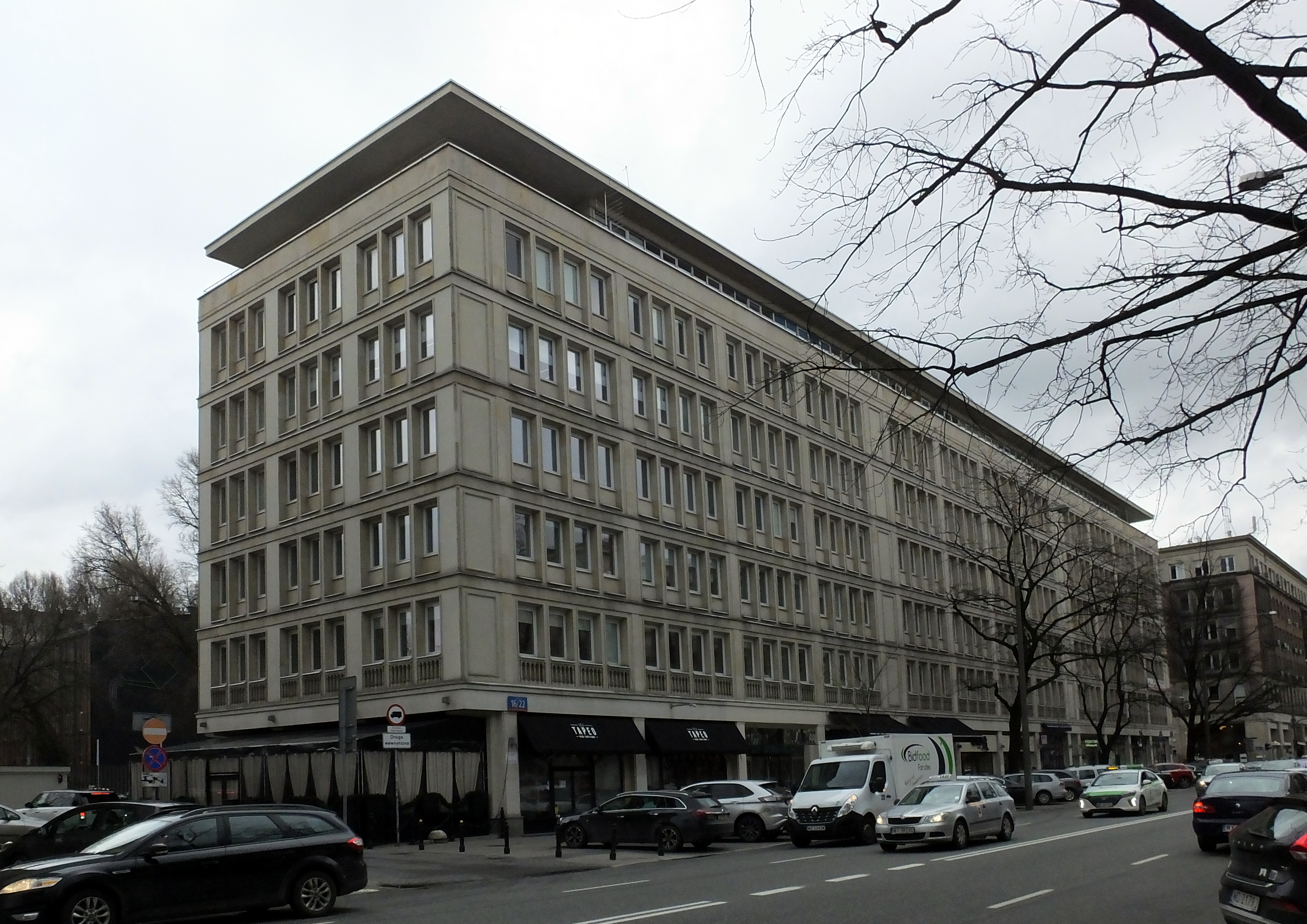 Centrum Biurowe Krucza, ul. Krucza 16/22, Wilcza 20 w Warszawie